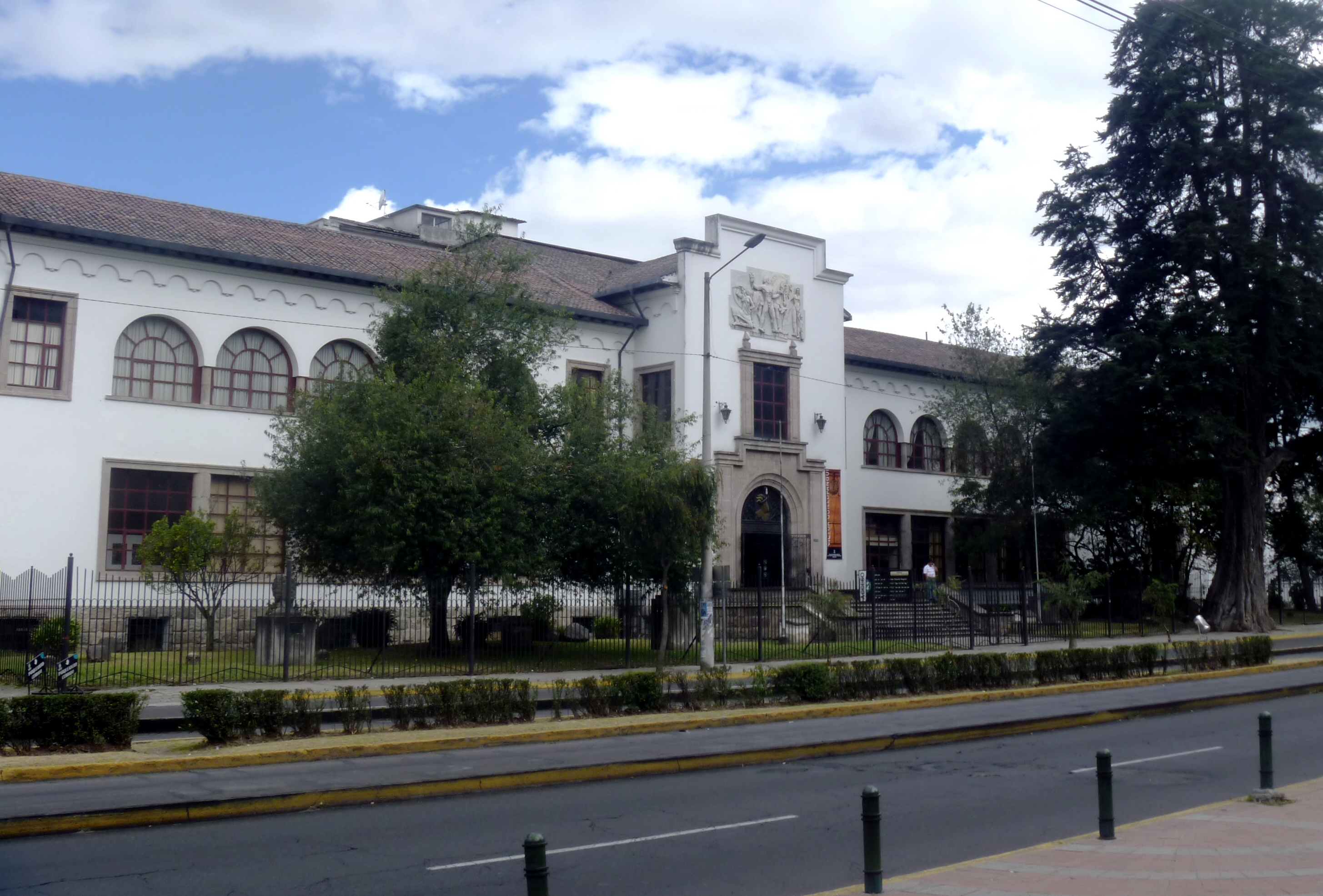 Edificio principal de la Casa de la Cultura Ecuatoriana, en Quito. También conocido como Casona de la CCE, alberga las oficinas de la entidad, algunos auditorios y pequeñas salas de exposición.